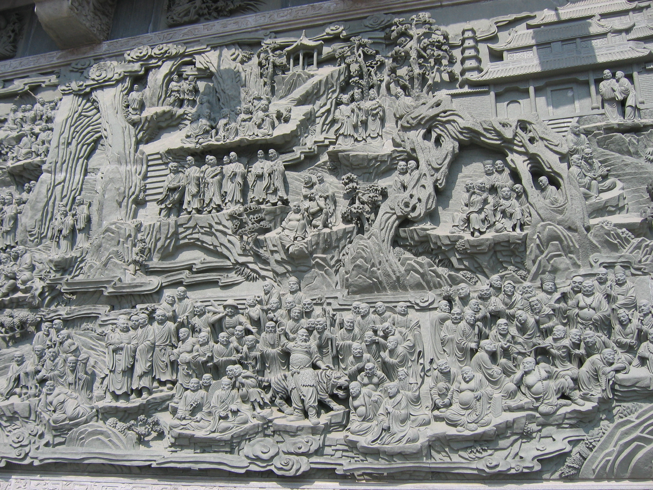 八大处公园内雕刻（1）